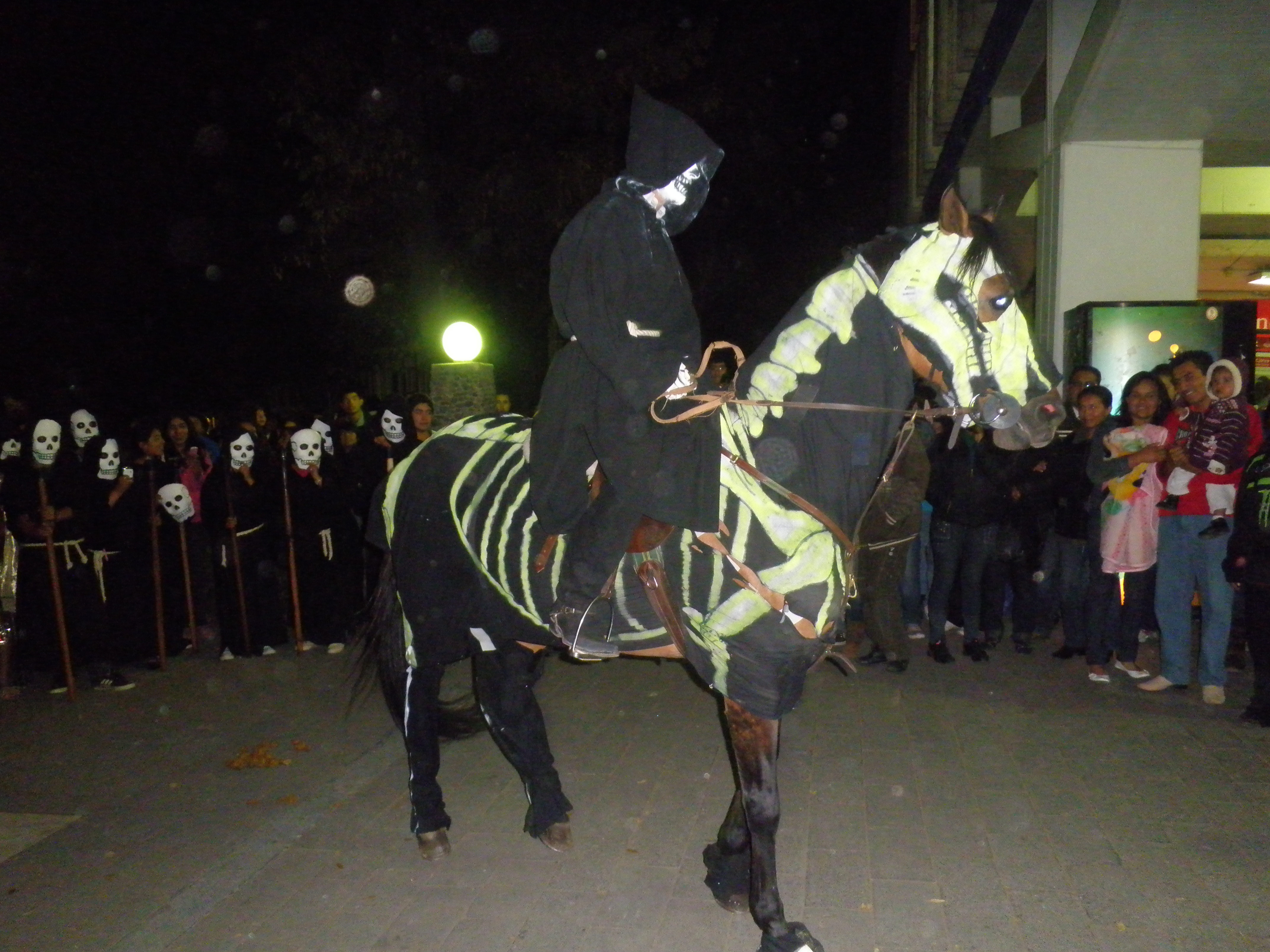 Jinete Fantasma.